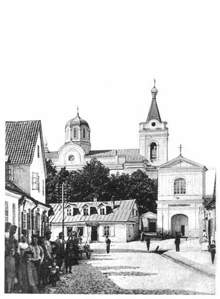 Былы кляштар бернардзінак, пазней - мужчынскі Барысаглебскі манастыр.